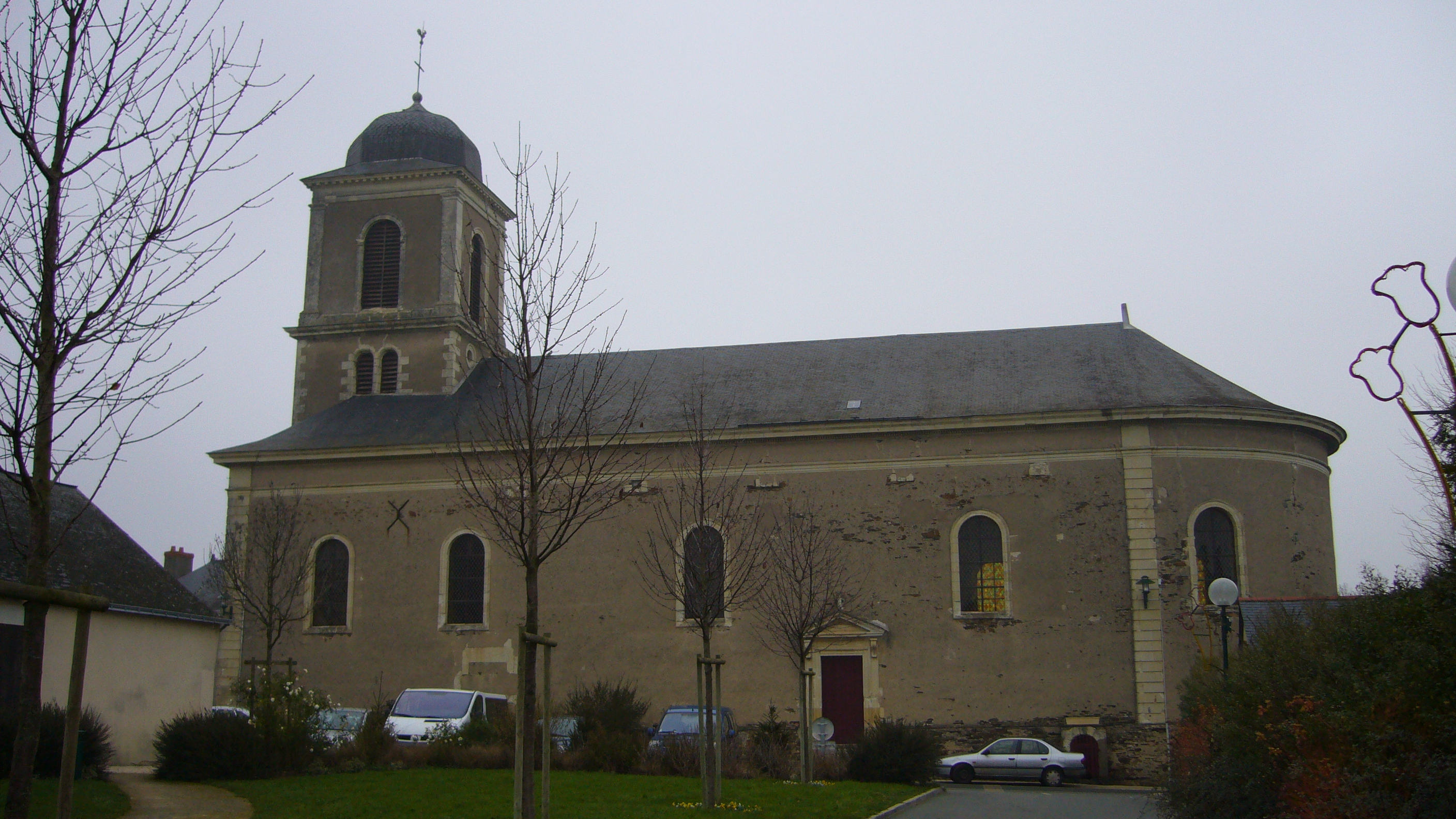 Église de Soulaines-sur-Aubance (Maine-et-Loire, France). Photo personnelle - 23 décembre 2006 --Alonso 23 décembre 2006 à 21:18 (CET)